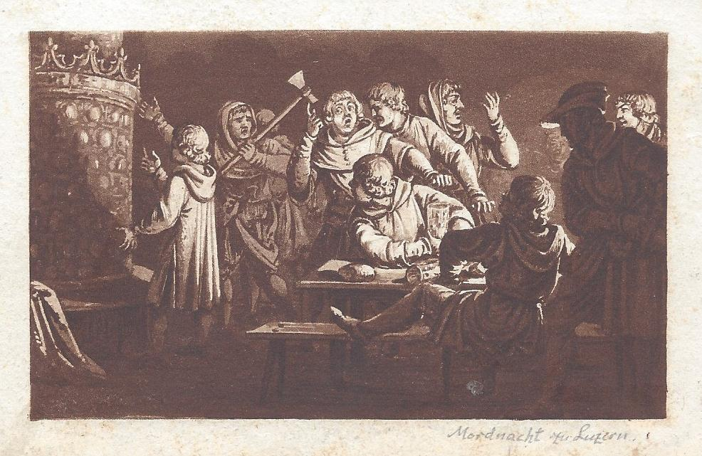 Aufbruch zur Luzerner Mordnacht. Anonyme Sepiaaquatinta um 1800.